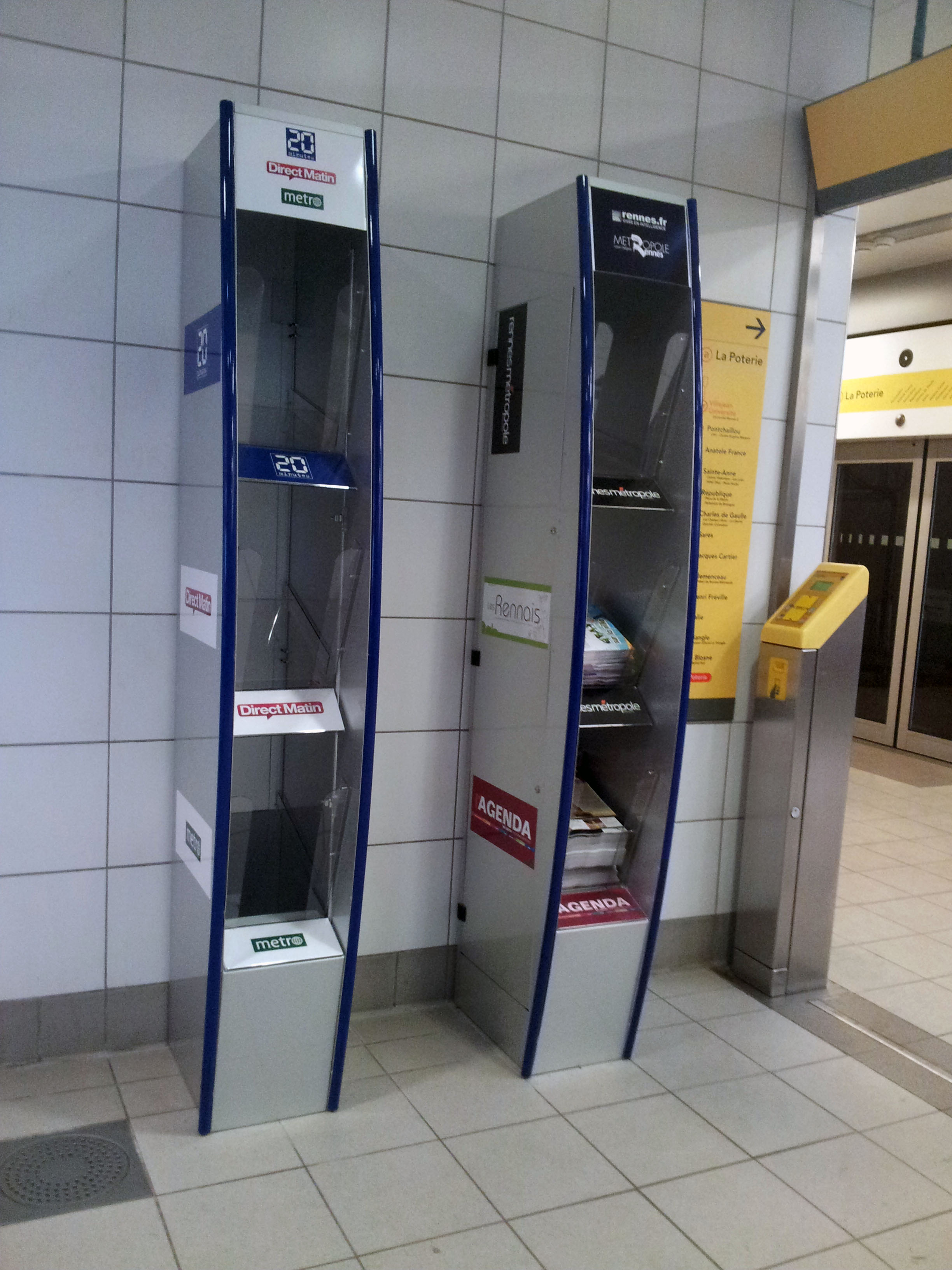 Présentoirs métro station Villejean-Université